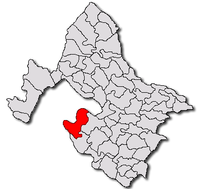 Categorie:Hărţi ale judeţului Mehedinţi